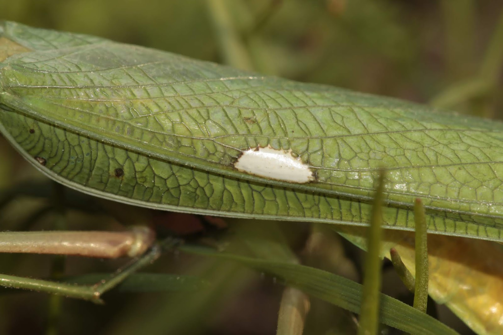 Mancha blanca en uno de los élitros de la mantis africana "Sphodromantis viridis", en Piedrabuena, Ciudad Real, en 2016.